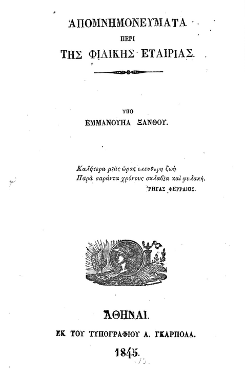 Απομνημονεύματα περί της Φιλικής Εταιρίας υπό Εμμανουήλ Ξάνθου ... Αθήναι Εκ του Τυπογραφείου Α. Γκαρπολά, 1845.